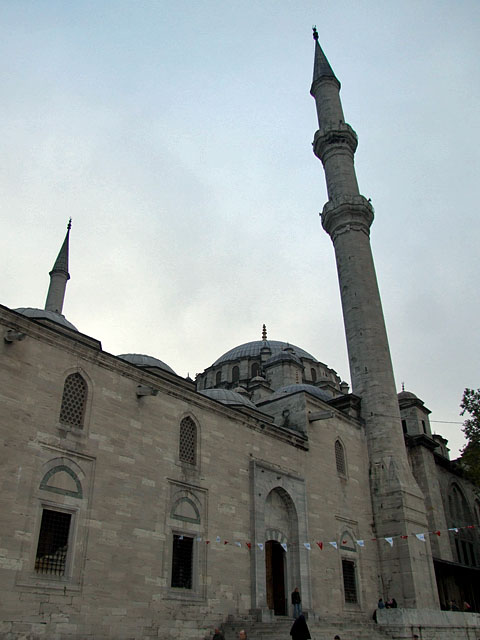 Fatih Mosque, Istanbul